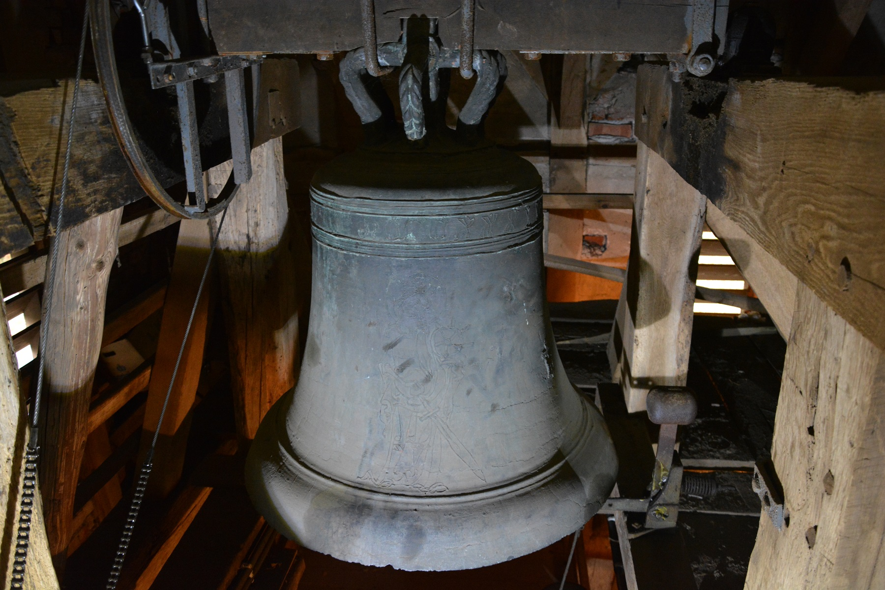 Die große gotische Glocke der ev.-luth. Marienkirche zu Uelzen-Veerßen.